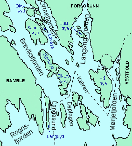 Islands in Porsgrunn, Telemark.